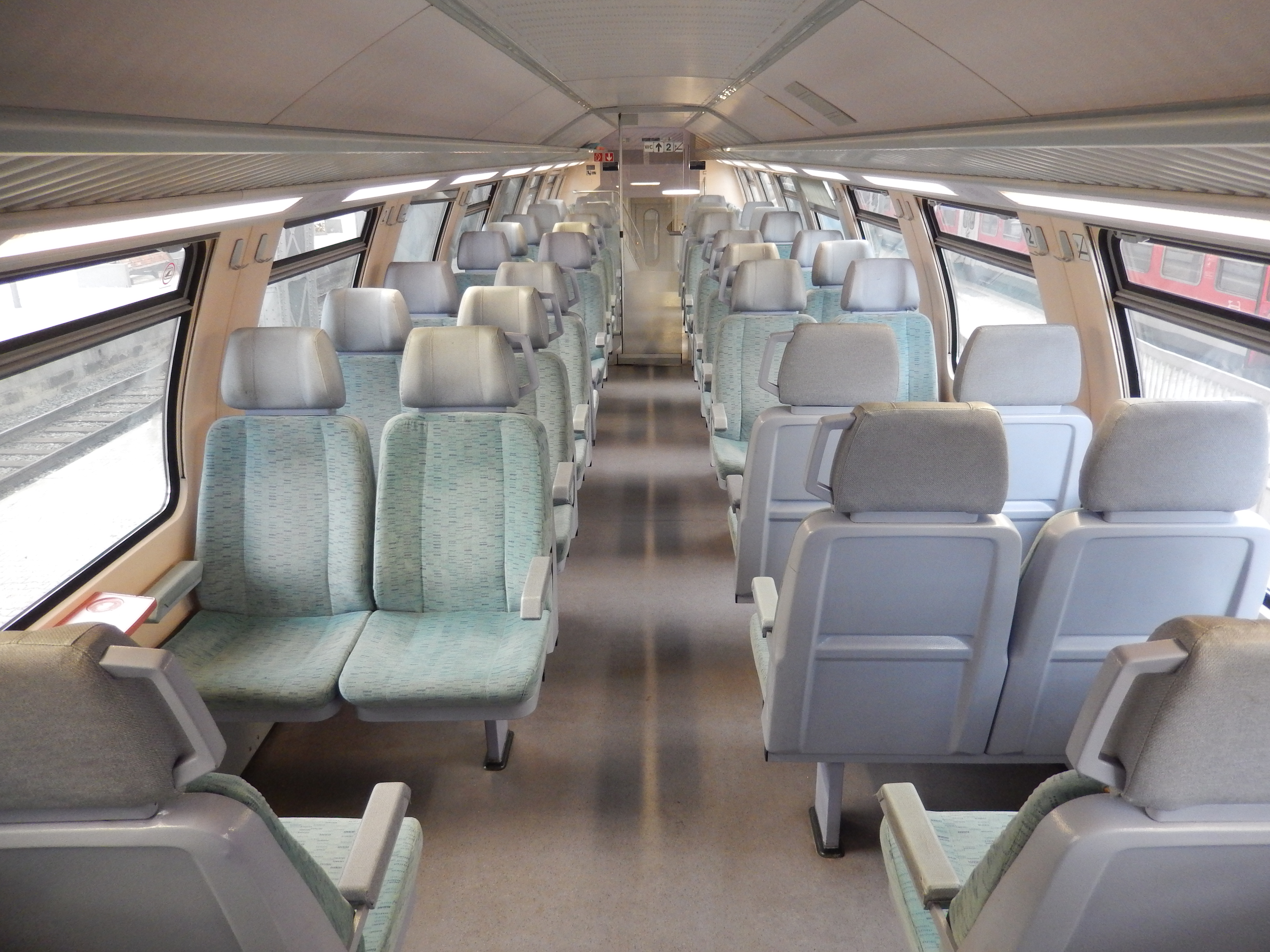 Der Innenraum der 2. Klasse eines Doppelstockwagens der Deutschen Bahn. Der Wagen steht im Frankfurter (Main) Hauptbahnhof.